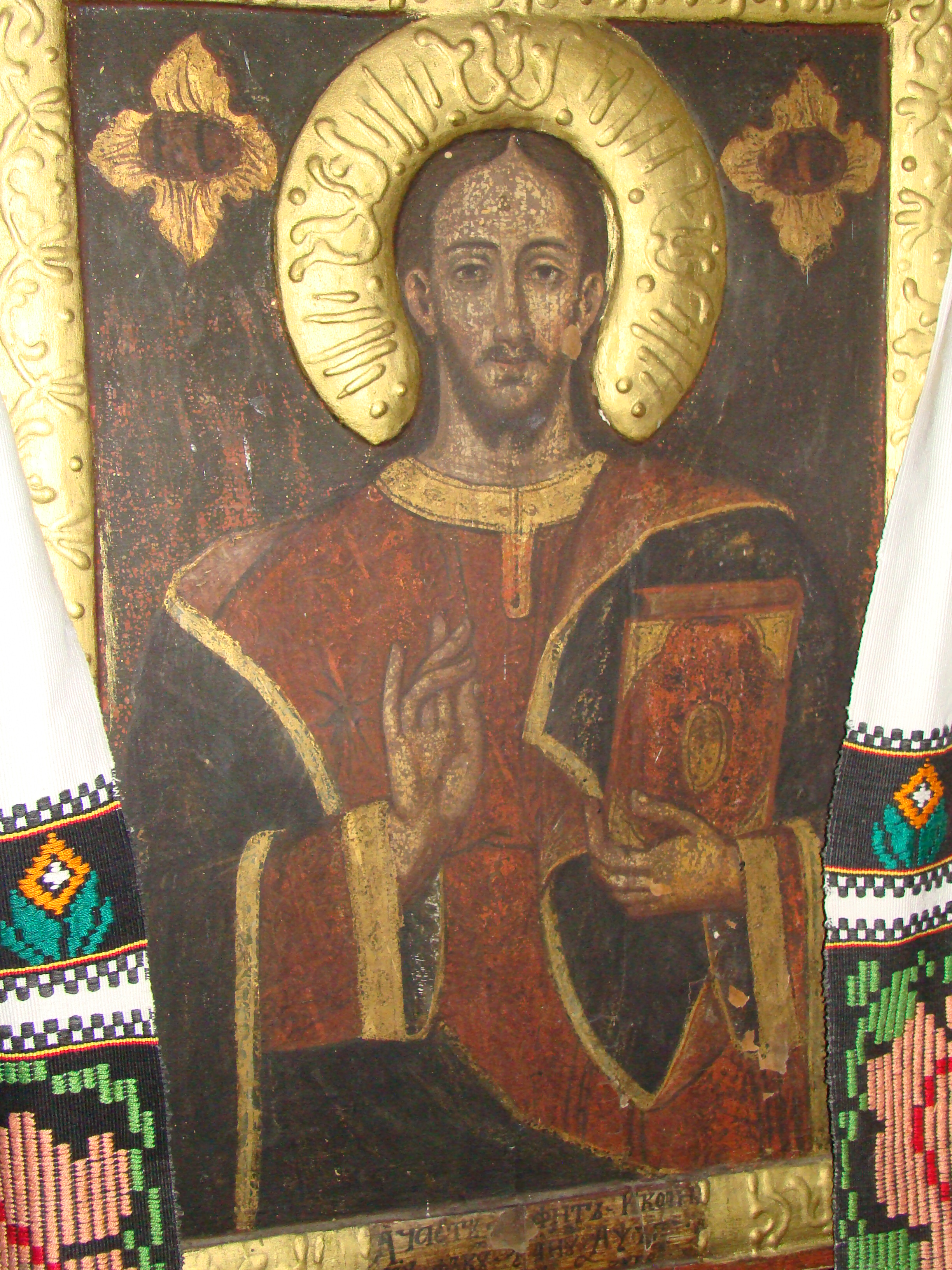 Biserica de lemn „Sf.Nicolae” din Căraci-Hunedoara